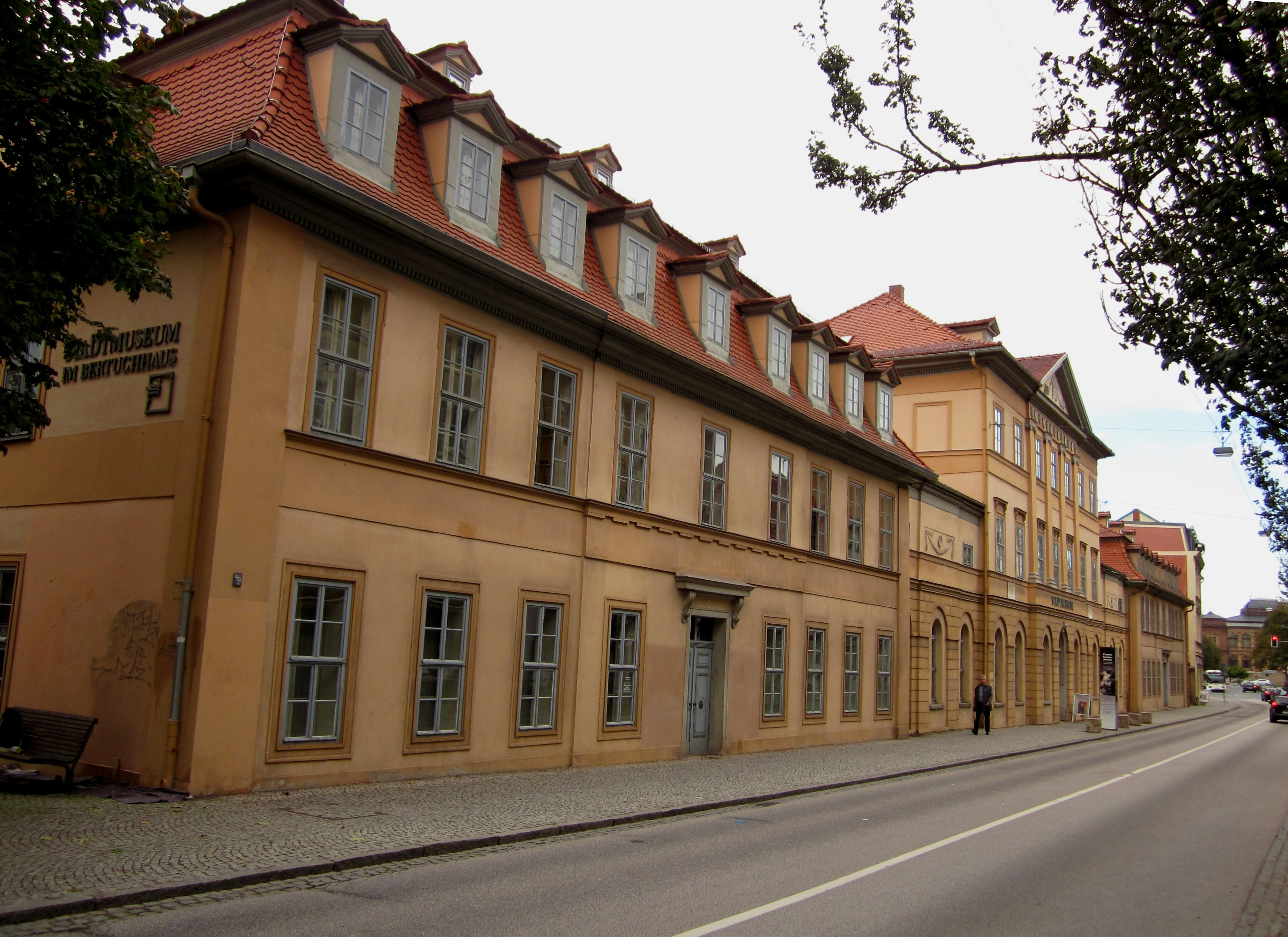 Denkmalensemble Altstadt, heute Stadtmuseum, 1780-82, 1800-03, von J.F.Steiner für Verleger F.J.Bertuchbzw. Chr.H.Schlüter